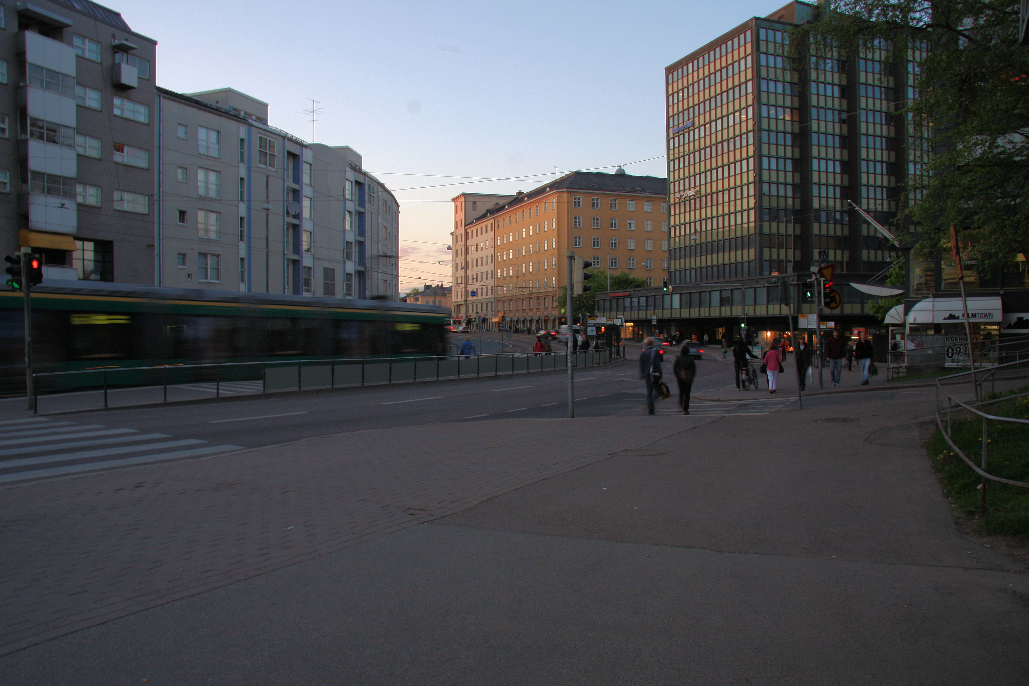 Kurvi, Sörnäinen, Helsinki, Finland